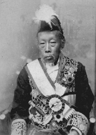 中御門経之の肖像写真。